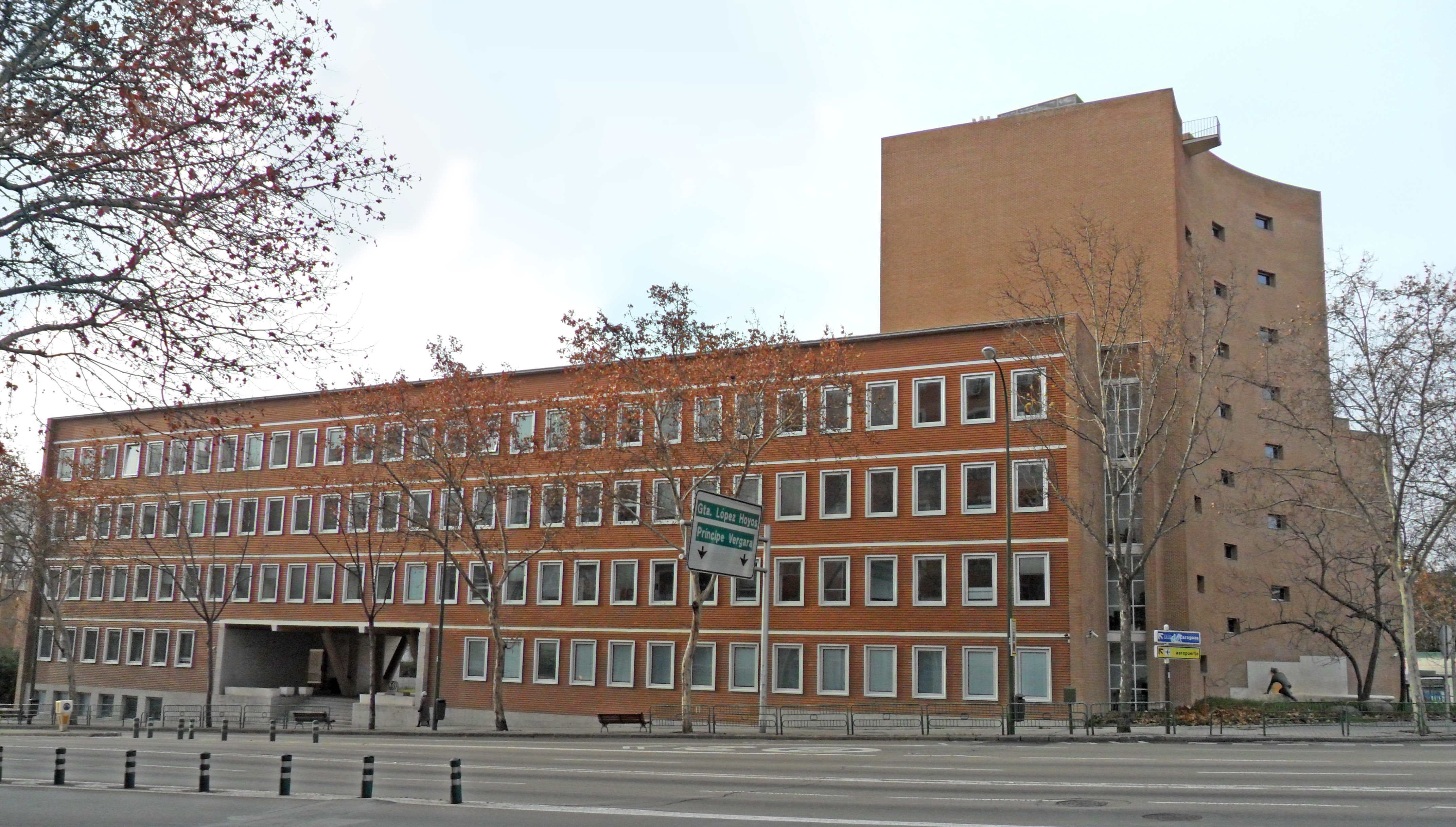 Sede de la Secretaría General de Pesca del Ministerio de Agricultura, Alimentación y Medio Ambiente de España, en el nº 144 de la Calle de Velázquez de Madrid, en el distrito de Chamartín. El edificio fue proyectado en 1951 por Miguel Fisac y construido de 1953 a 1956.